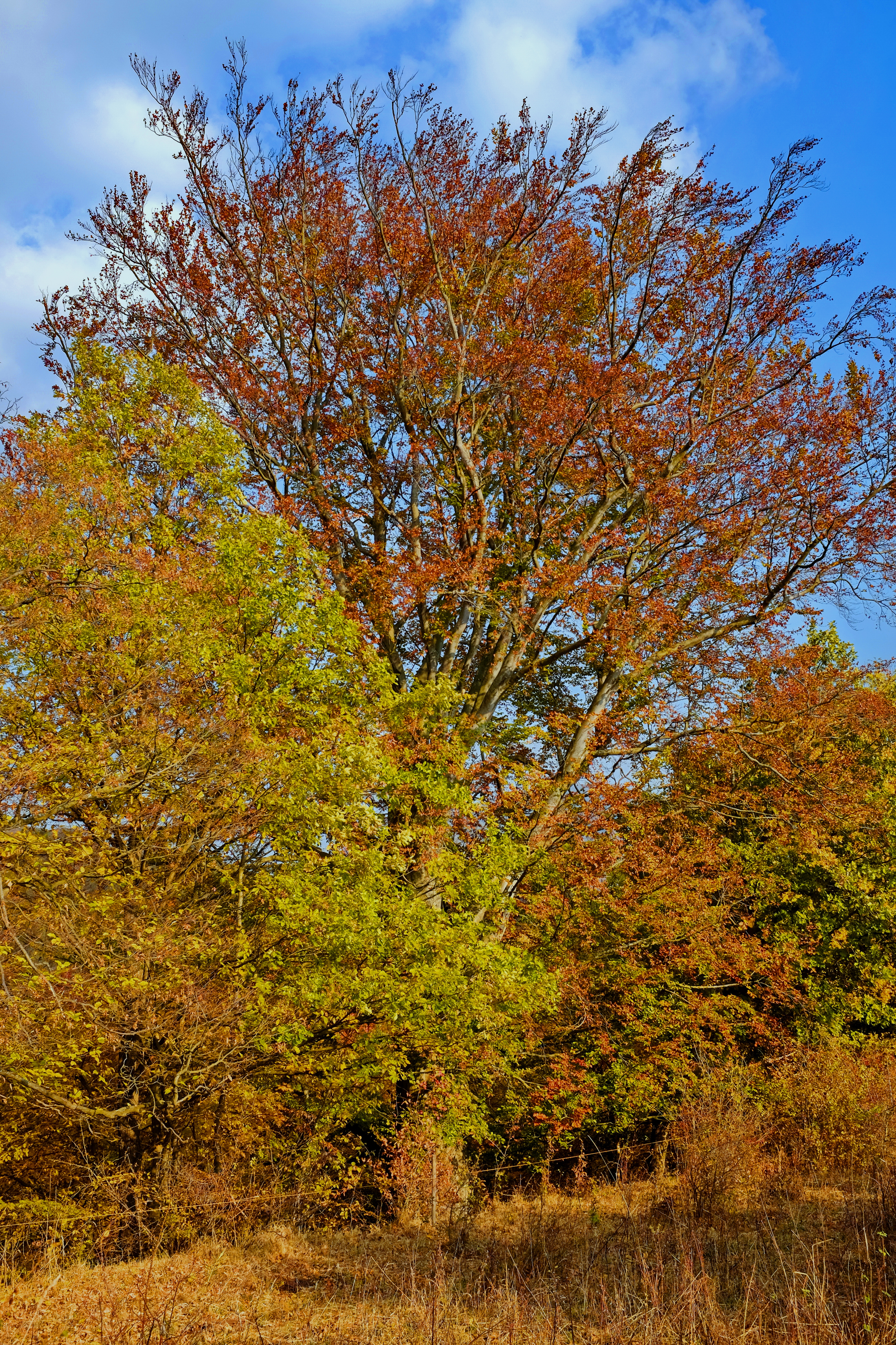 Památný strom - Buk u Stráže, Stráž nad Ohří, Doupovské hory, okres Karlovy Vary